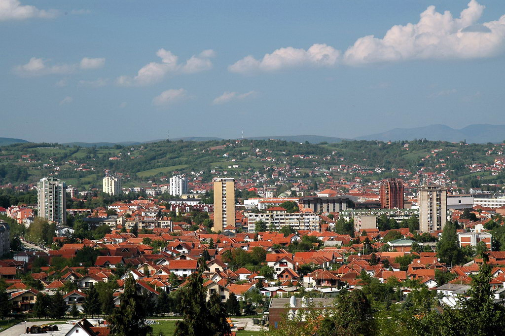 Cacak